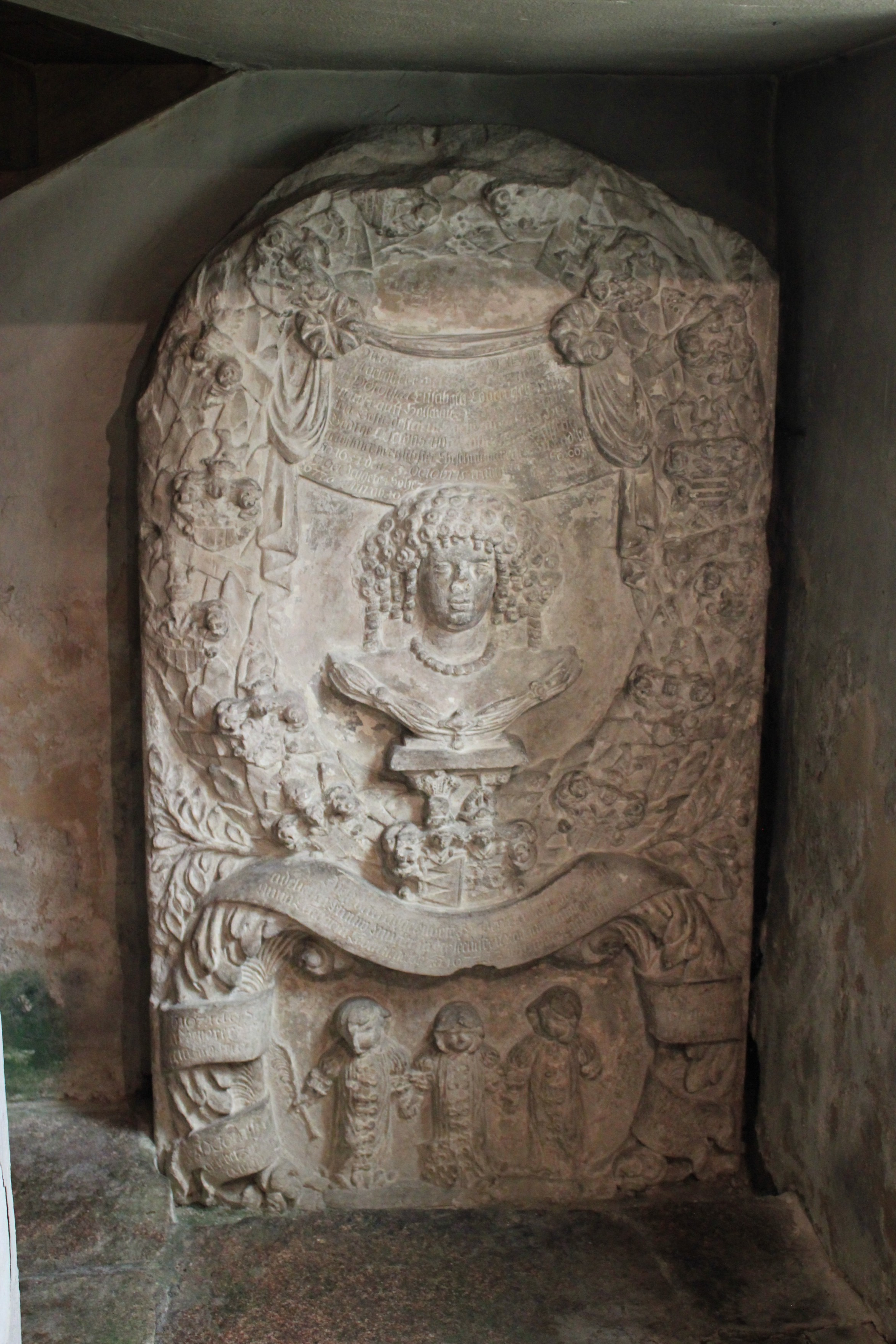 Hornjoserbsce: Stary narowny pomnik w Njeswačanskej cyrkwi.